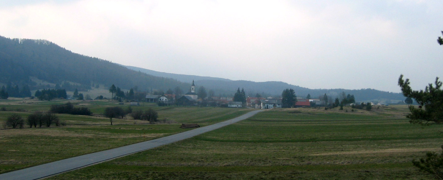 Velike Bloke, village in Slovenia photo:Ziga 20:03, 7 April 2007 (UTC)